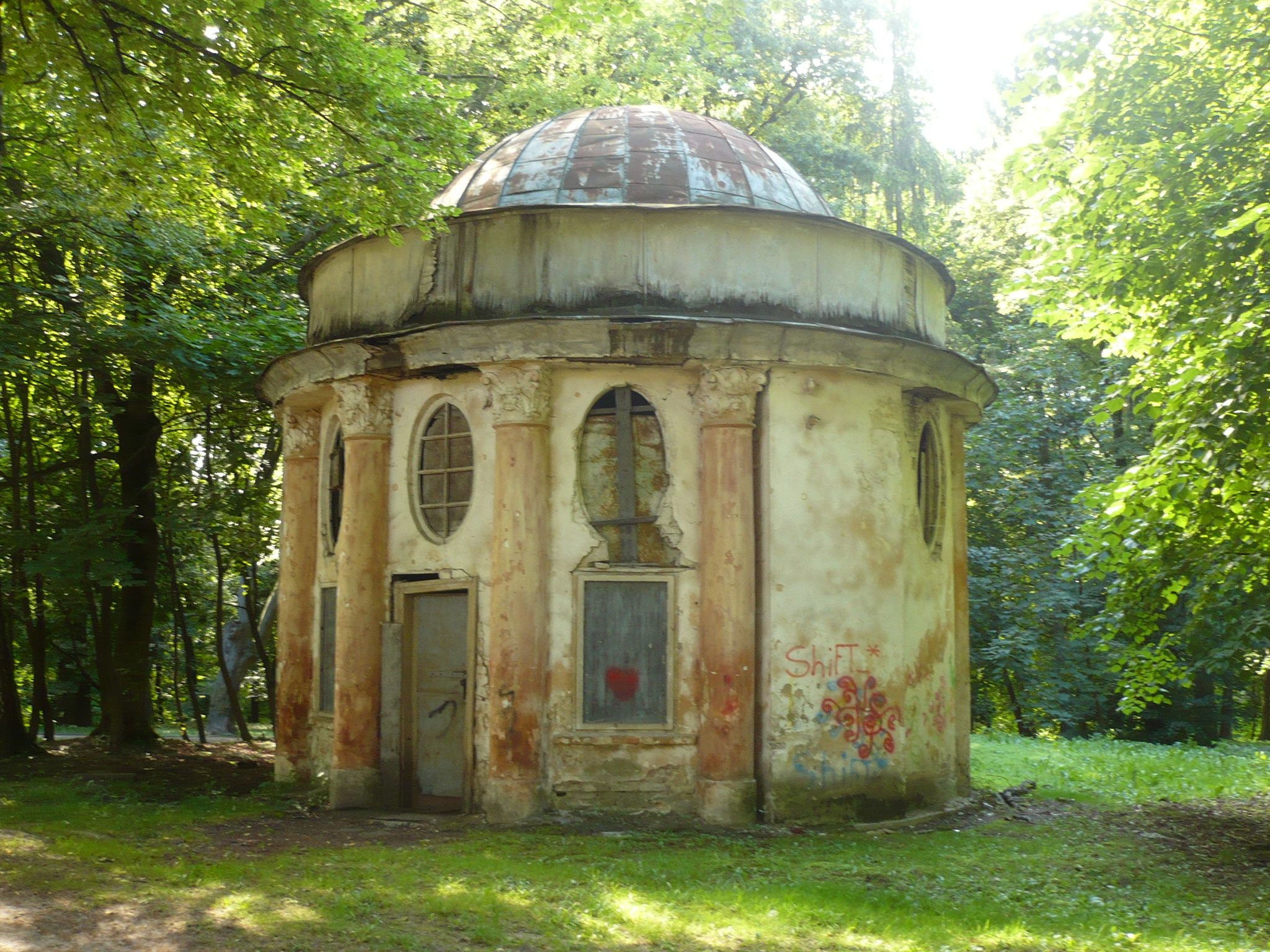 Lwów. Bydunek w Parku Stryjskim